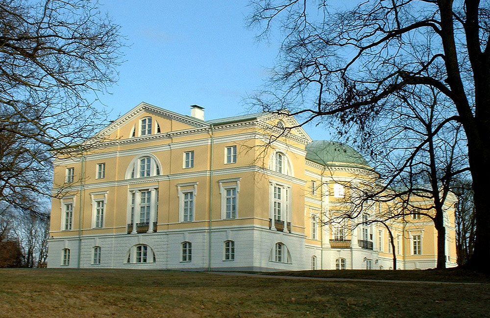 Schloss Mesothen, Lettland